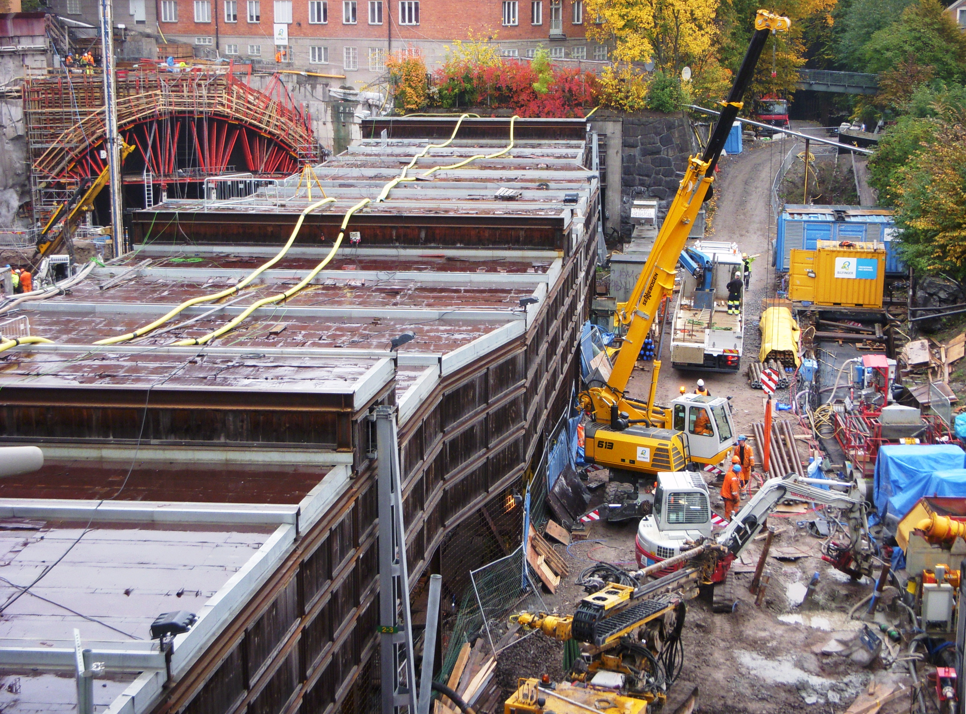 Södermalmstunneln, byggplats vid Stockholms Södra